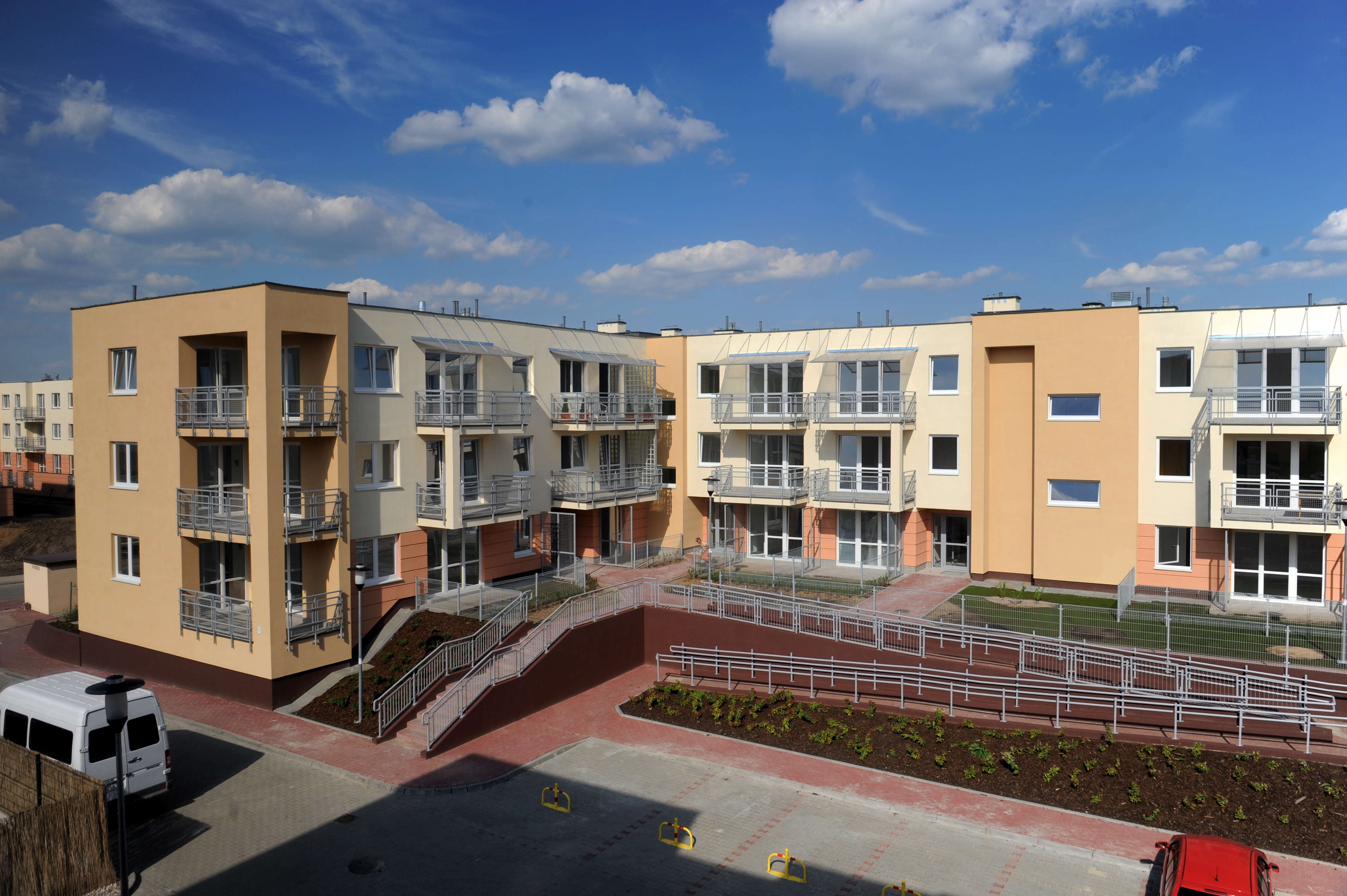 Budowa osiedla Derby 15, budynki C-G. Białołęka.